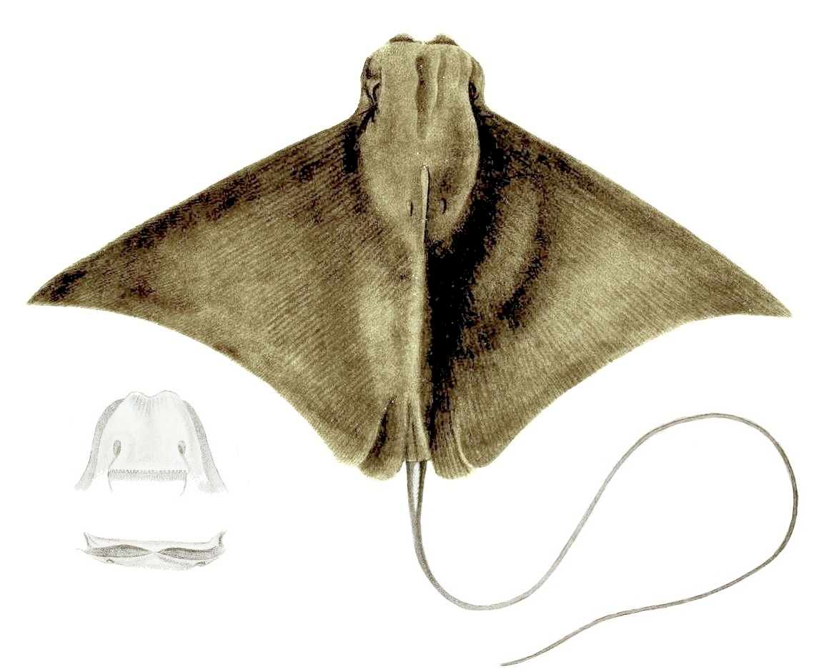 Javanischer Kuhnasenrochen (Rhinoptera javanica)